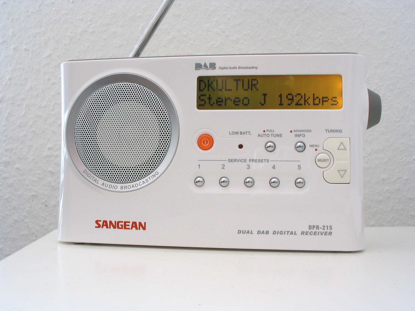 Digital Receiver Sangean DPR-215